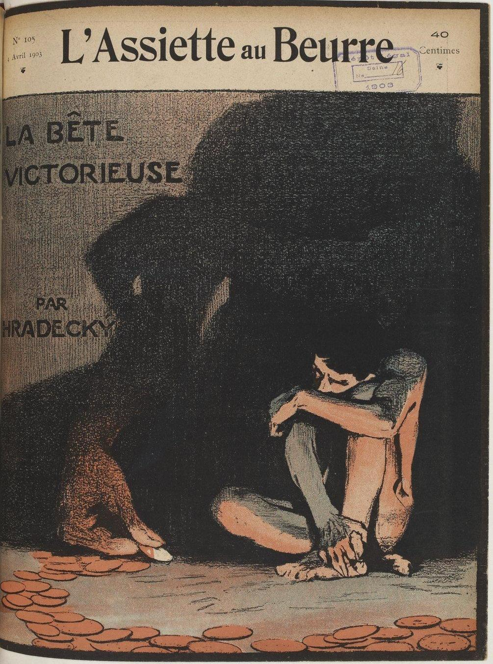 « La bête victorieuse » par Václav Hradecký, in L'Assiette au beurre n° 105.